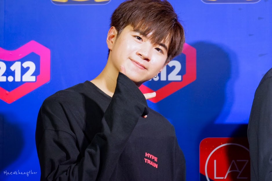 ภาพจากงาน 1212 Lazada TH